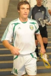 Сергей Пшеничных - украинский футболист